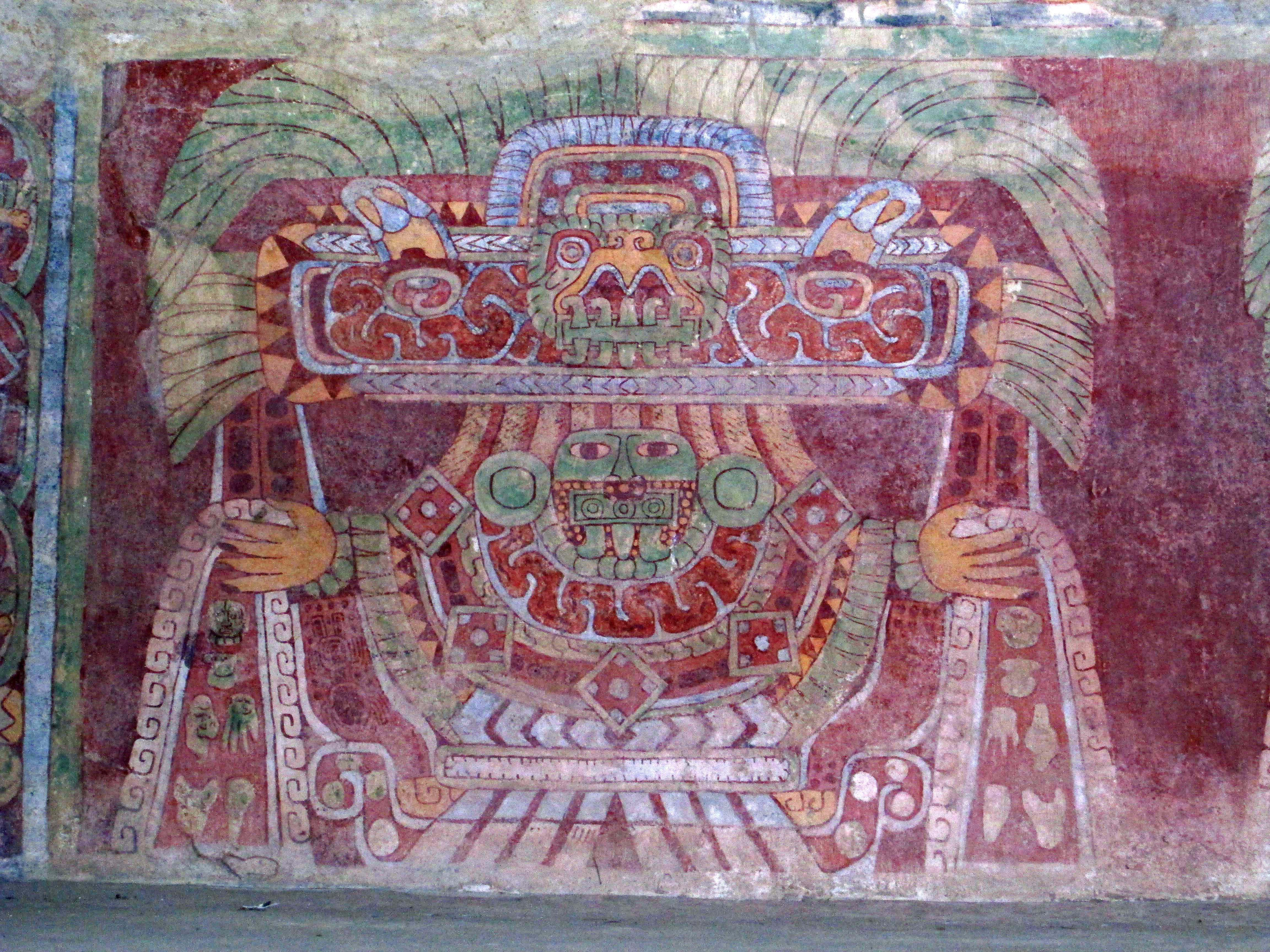 Mural del complejo habitacional de Tetitla en Teotihuacan, representa a la Diosa de Jade o Tlaloc Verde